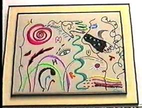 "Broderie Abstrait" toile brodée de SMR